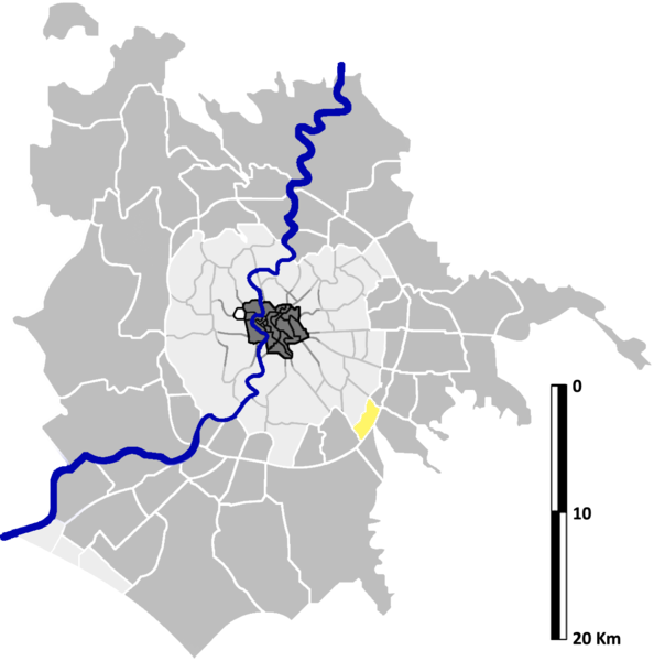 Capannelle